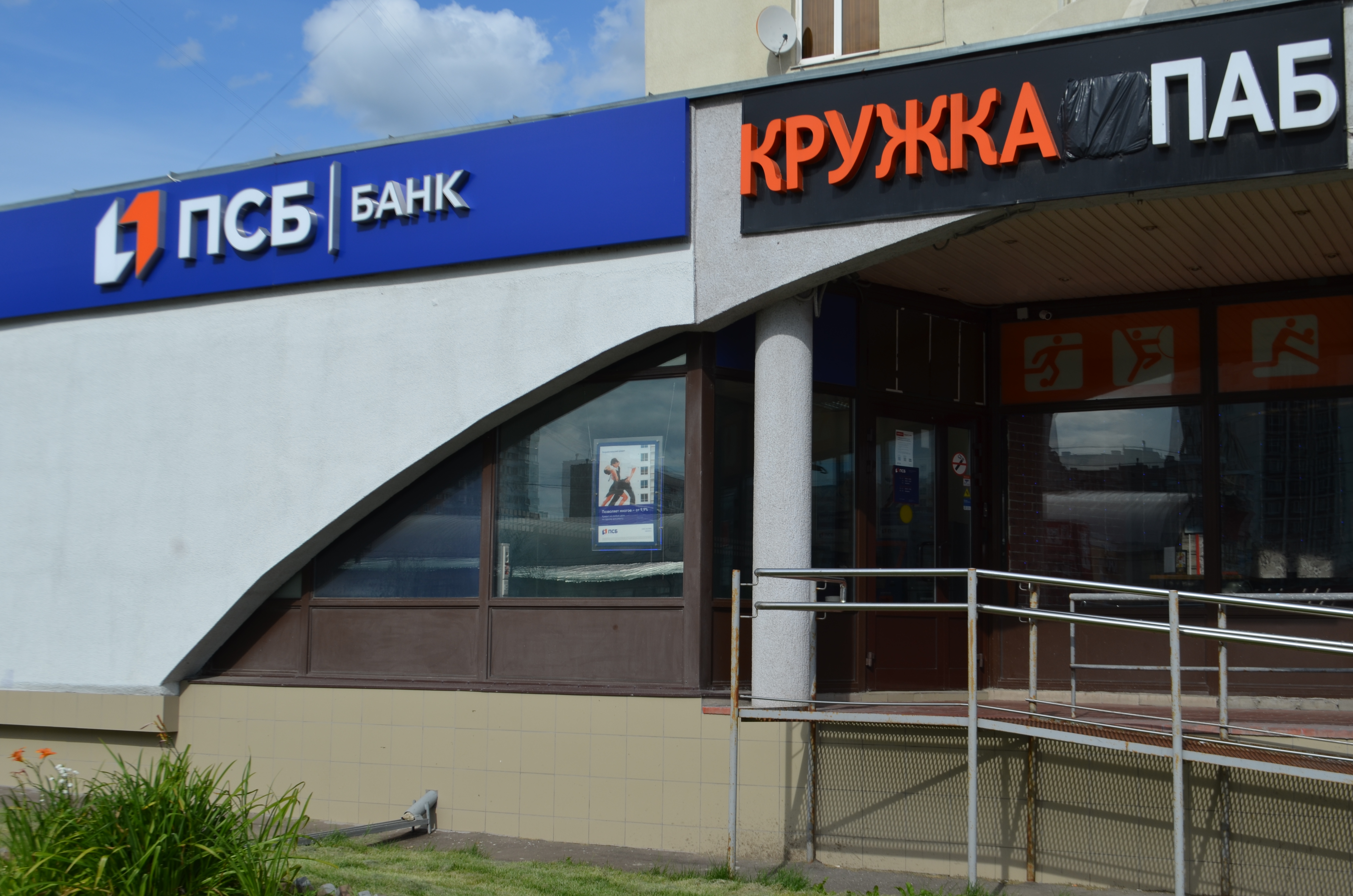 Отделение Промсвязьбанка в Москве на Люблинской улице (дом 163/1) в районе Марьино, с обновлённым логотипом банка